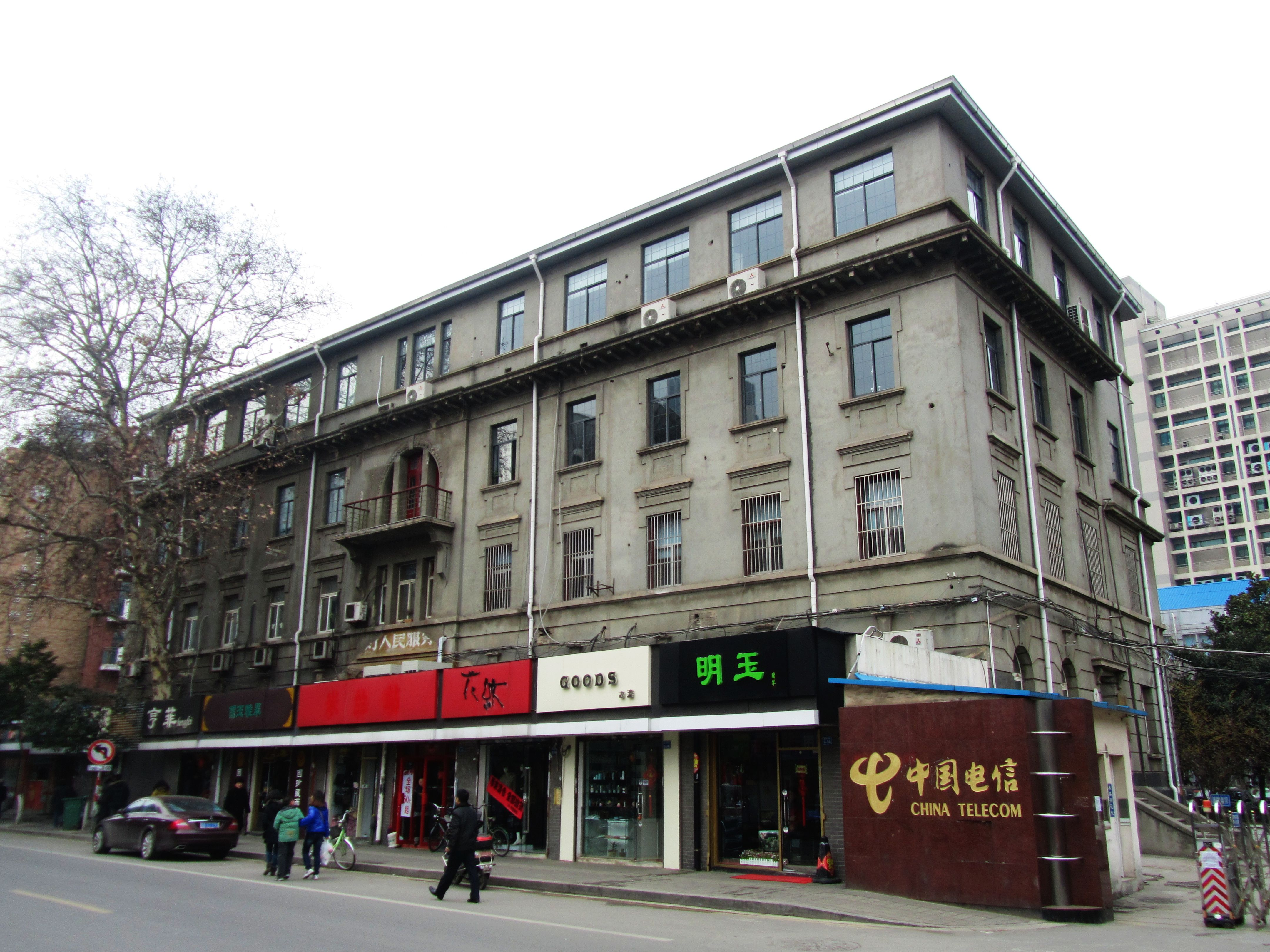 南京电信局旧址，外观。